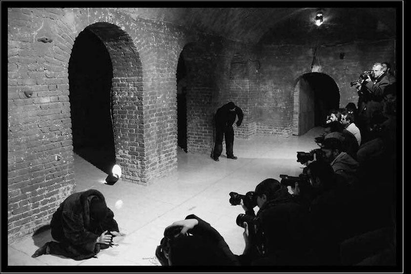 نمایش کاسپار (محسن معینی) ۱۳۹۲